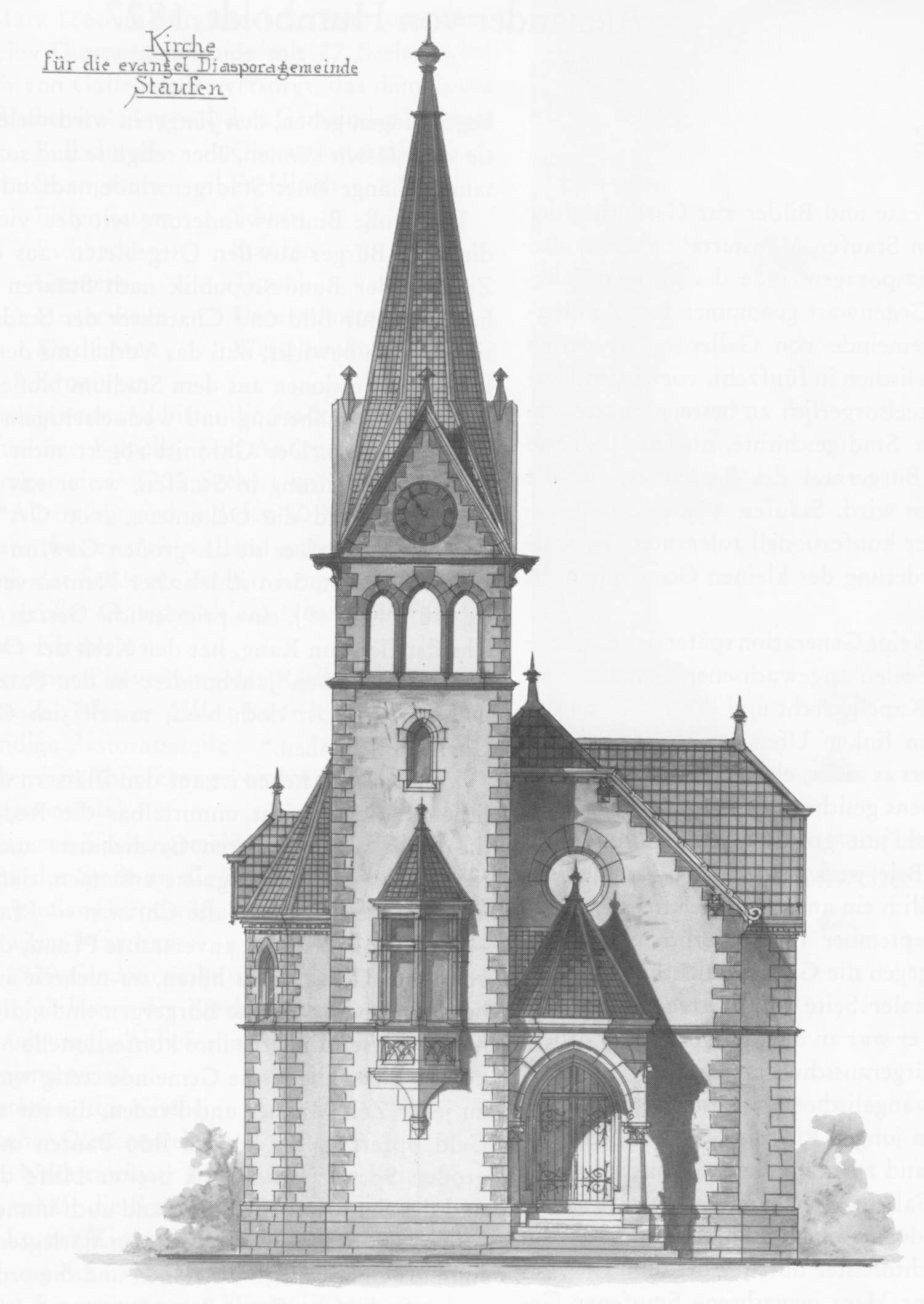 Bauzeichnung für die evangelische Kirche Staufen im Breisgau, 1897